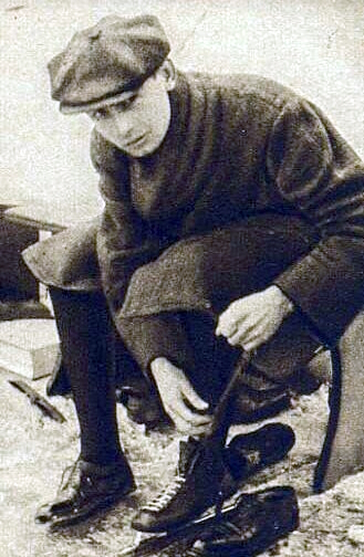 Jaromír Turnovský, rychlobruslař ČSR, 1933